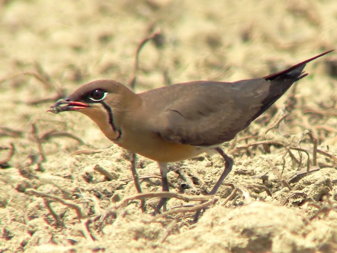 Oriental Pratincole - Glareola maldivarum